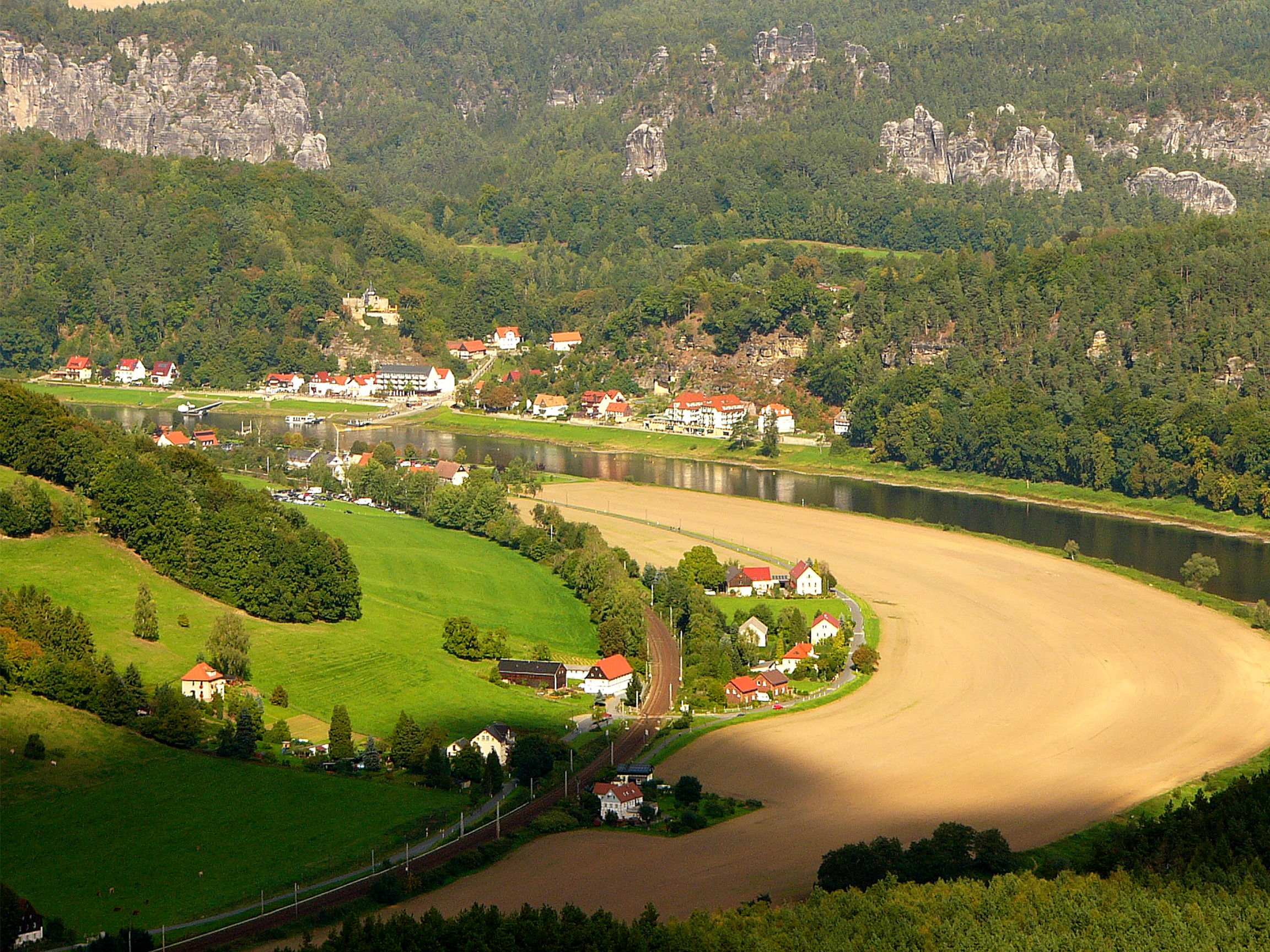 Kurort Rathen in der Sächsischen Schweiz; vom Lilienstein aus fotografiert